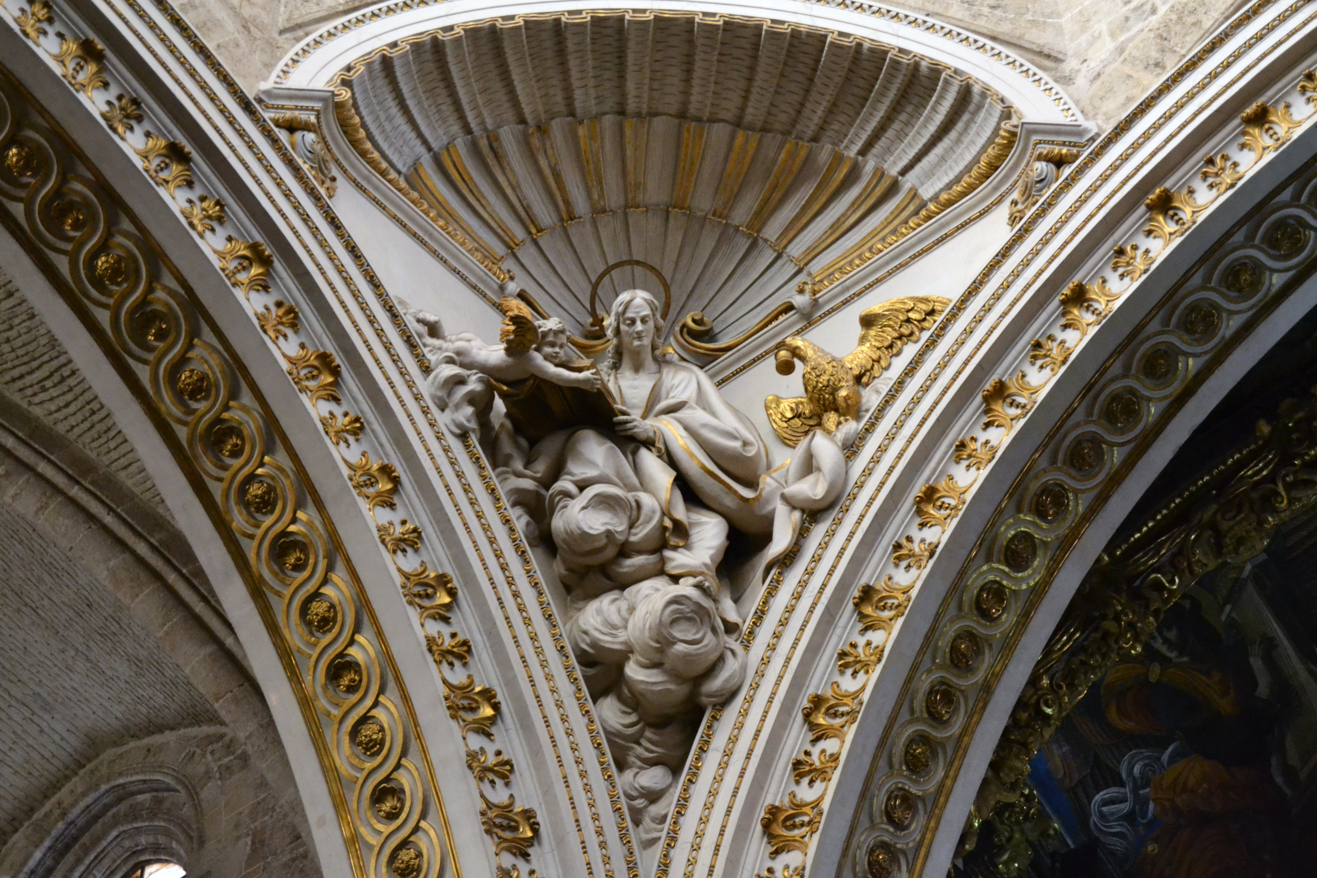 Petxina amb Joan l'Evangelista, catedral de València.